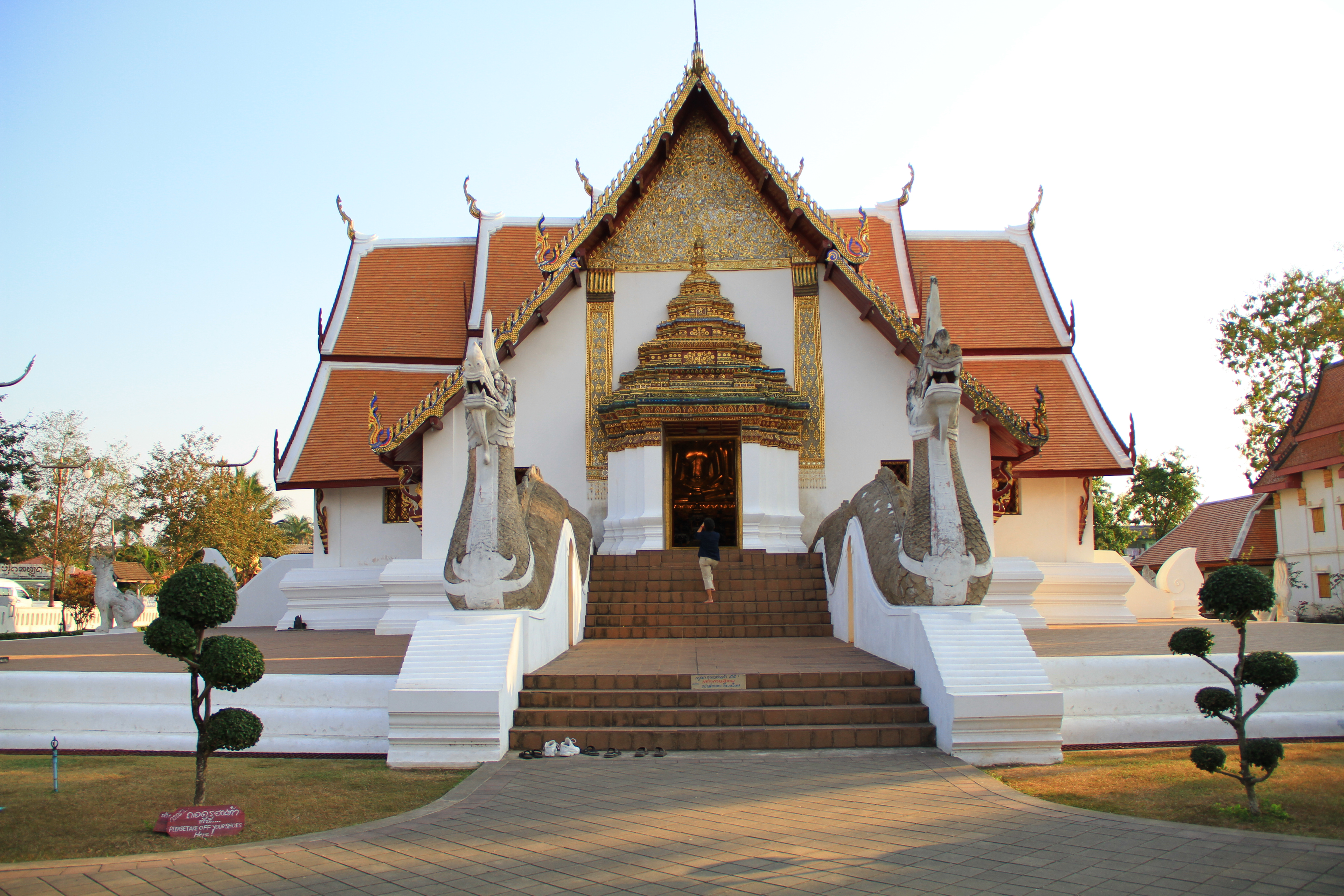 วัดภูมินทร์ อยู่ใกล้พิพิธภัณฑสถานแห่งชาติน่านเป็นวัดที่มีลักษณะแปลกกว่าวัดอื่น ๆ คือ โบสถ์และวิหาร สร้างเป็นอาคารหลังเดียวกัน ประตูไม้ทั่งสี่ทิศ แกะสลักลวดลายงดงามโดยฝีมือช่างเมืองน่าน นอกจากนี้ฝาผนังแสดงถึงชีวิตและวัฒนธรรมของยุดสมัยที่ผ่านมาความสวยแปลกของวัดภูมินทร์ คือ เป็นพระอุโบสถและพระวิหารสร้างเป็นอาคารหลังเดียวกัน เป็นทรงจัตุรมุข (กรมศิลปากร ได้สันนิษฐานว่าเป็นอุโบสถจัตุรมุขหลังแรกของประเทศไทย) นาคสะดุ้งขนาดใหญ่ แห่แหนพระอุโบสถเทินไว้บนกลางลำตัว ตรงใจกลางพระอุโบสถประดิษฐานพระพุทธรูปปางมารวิชัยขนาดใหญ่สี่องค์ ประทับนั่งบนฐานชุกชี หันพระพักตร์ออกด้านประตู ทั้งสี่ทิศ เบื้องพระปฤษฎางค์ชนกัน ภายในพระอุโบสถ มีภาพจิตรกรรมฝาผนังศิลปกรรมไทลื้อ ที่เล่าเรื่องชาดก ตำนานพื้นบ้าน และความเป็นอยู่ของชาวน่านในอดีต